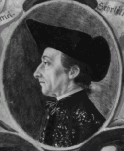 Johannes Künzle, Stich von Laurenz Halder aus dem Jahr 1795